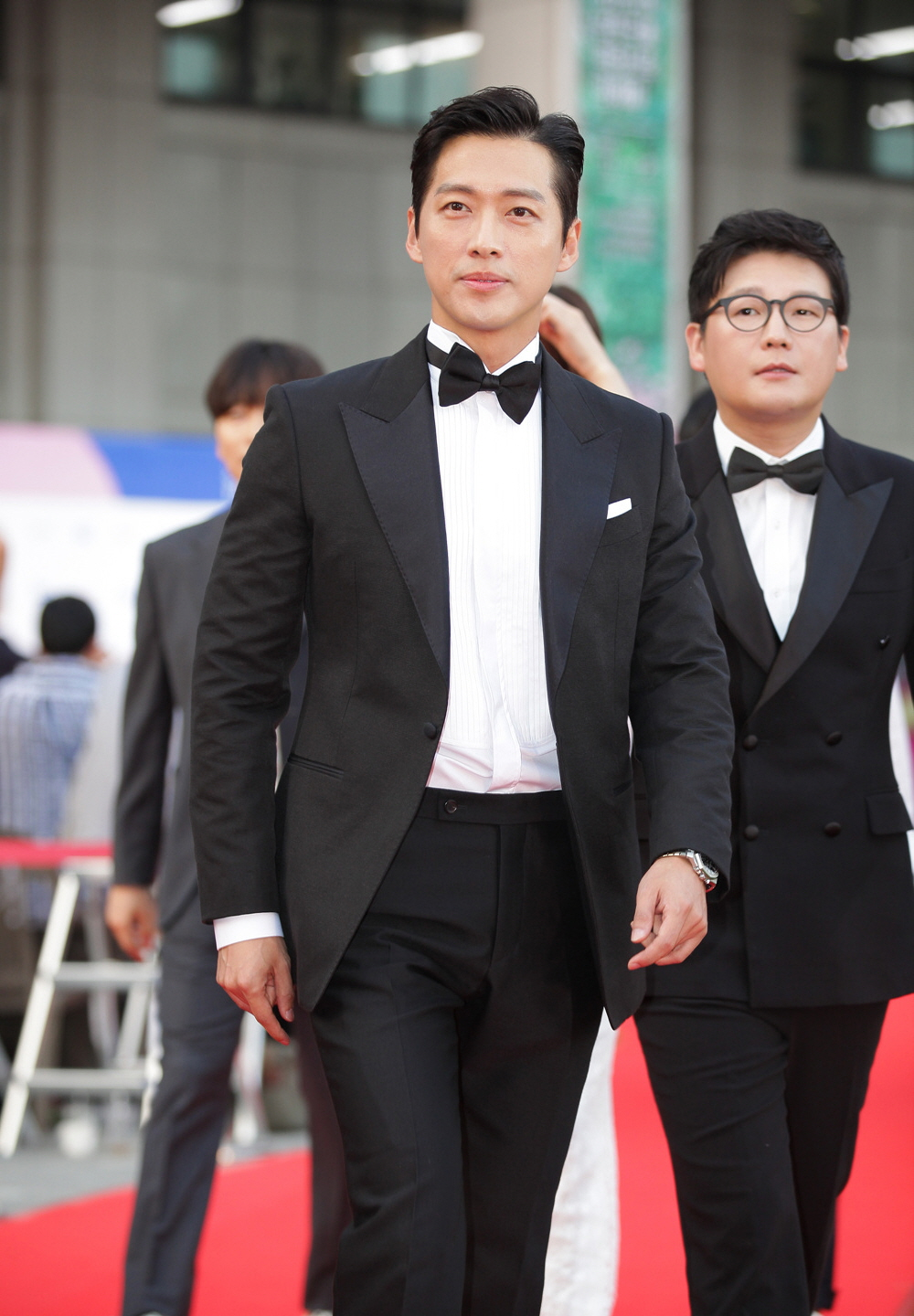 2017 부천국제판타스틱영화제(BIFAN) 레드카펫 . 남궁민